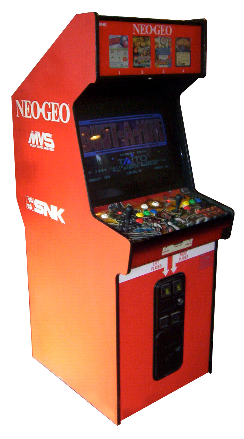 NeoGeo arcade video game cabinet